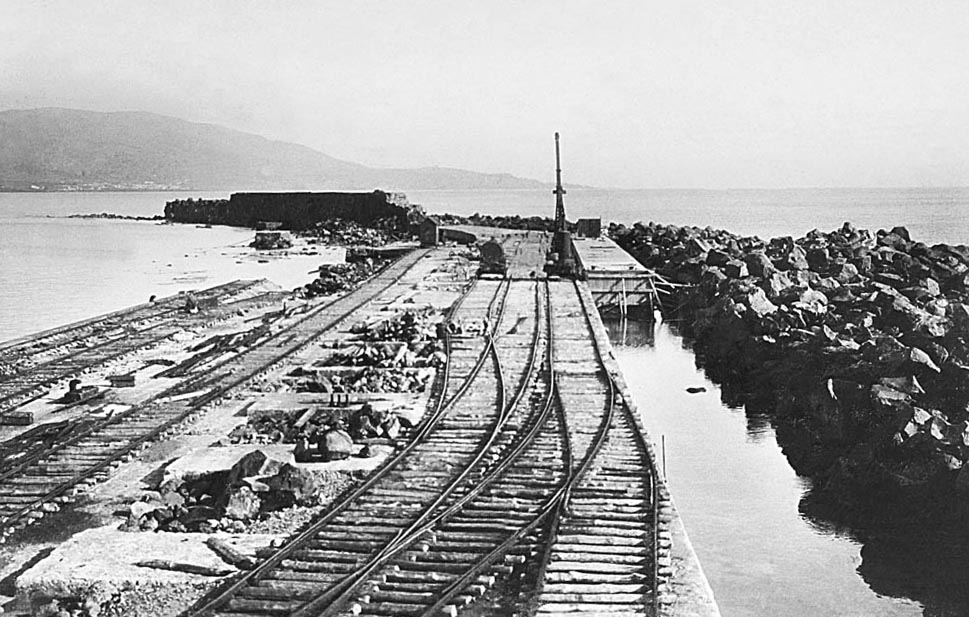 Porto de Ponta Delgada no final dos anos 60